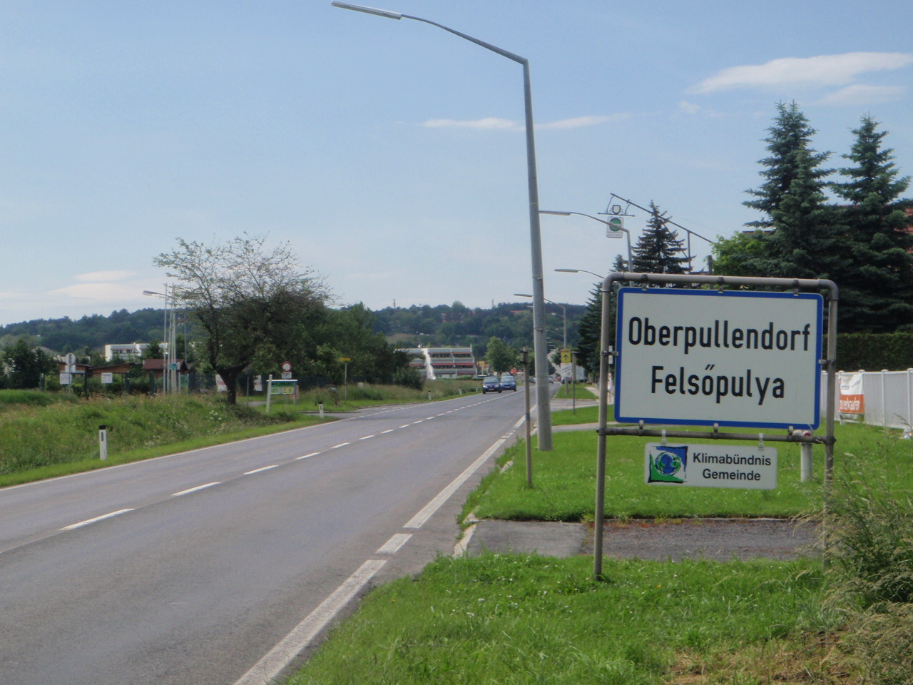 Zweisprachige Ortstafel